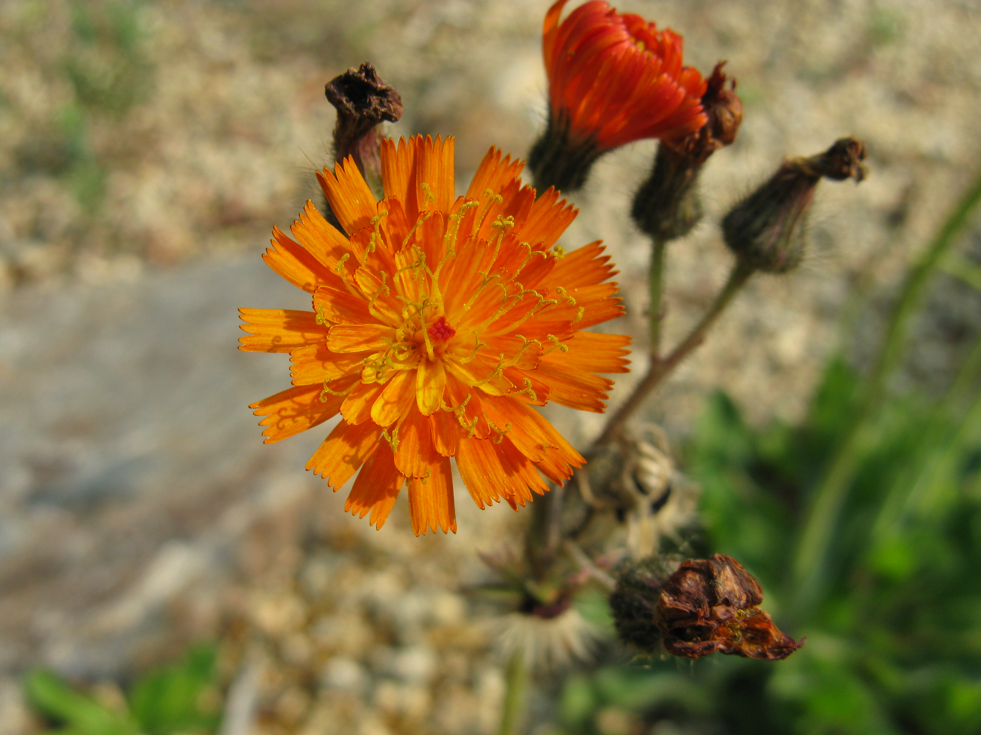 Hieracium aurantiacum